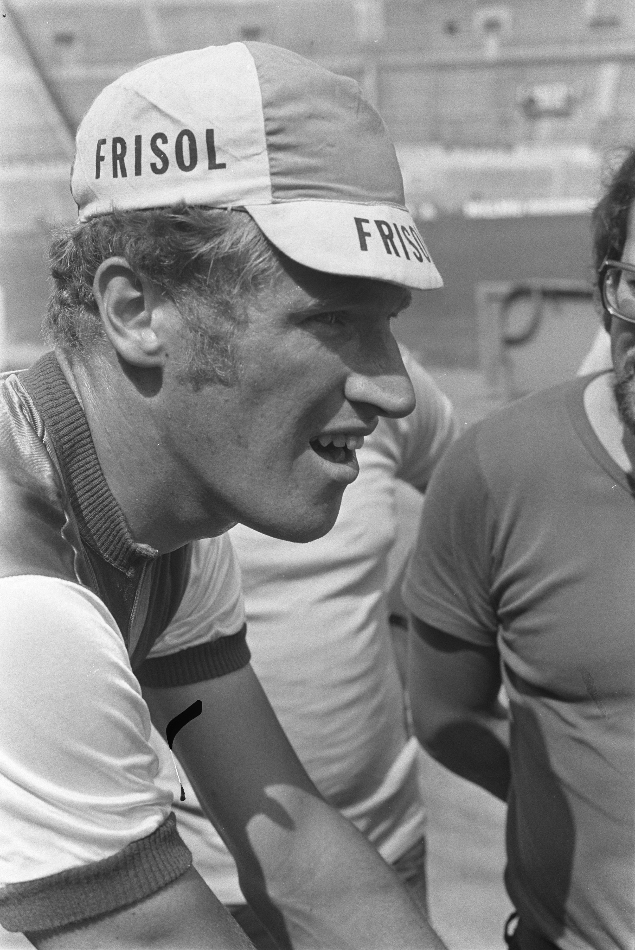 Collectie / Archief : Fotocollectie Anefo Reportage / Serie : [ onbekend ] Beschrijving : Nederlands kampioenschap Wielrennen tijdrit 1 kilometer voor amateurs in Olympisch Stadion, nummer 11 Peter van Doorn (kop) Datum : 20 juli 1972 Trefwoorden : wielrennen Persoonsnaam : Doorn, Peter van Fotograaf : Punt, […] / Anefo Auteursrechthebbende : Nationaal Archief Materiaalsoort : Negatief (zwart/wit) Nummer archiefinventaris : bekijk toegang 2.24.01.05 Bestanddeelnummer : 925-7556